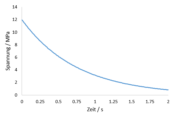 Relaxation eines Werkstoffs, typischer Verlauf